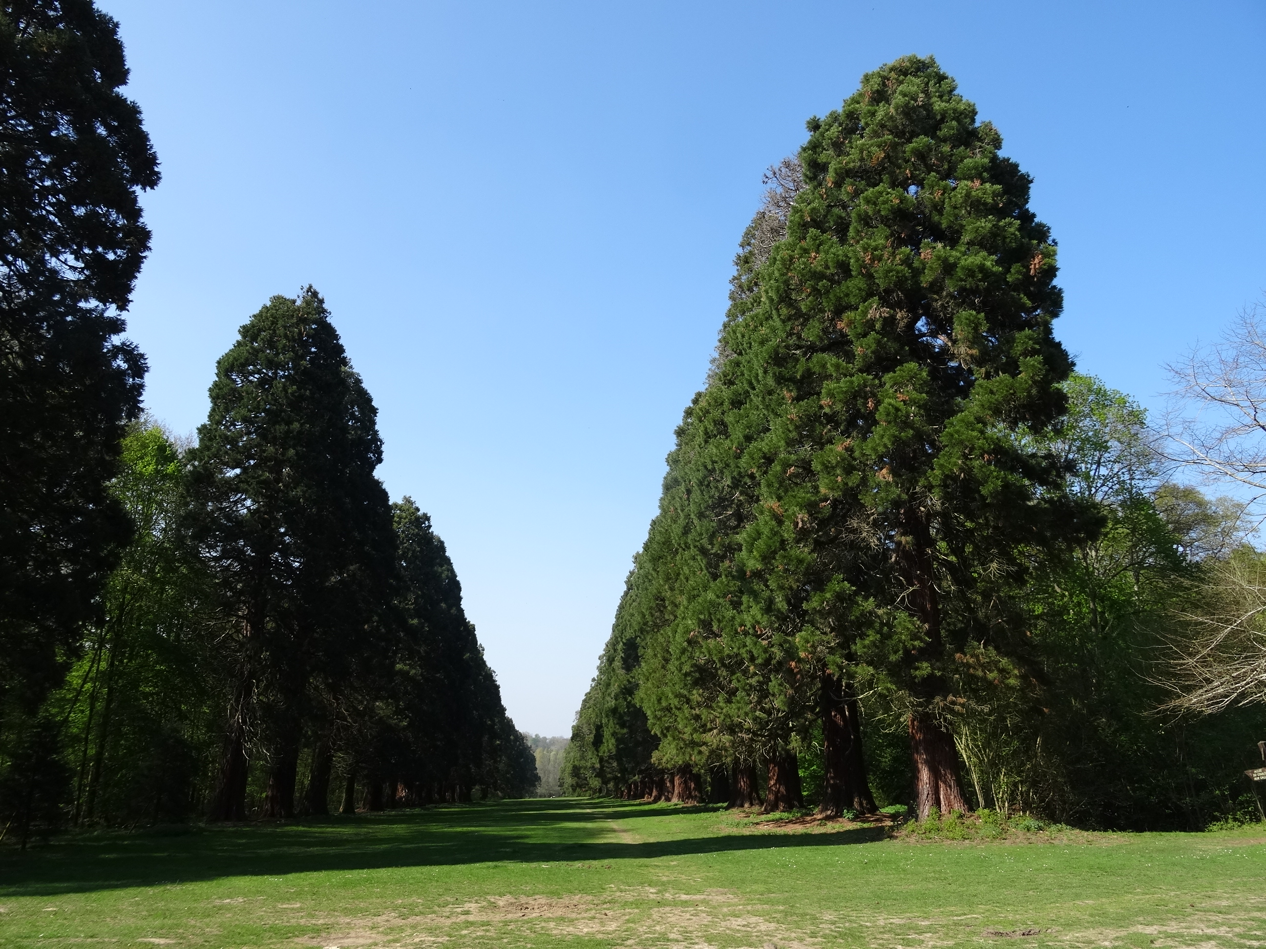 Parc de Villeroy, allée des Séquoias, Mennecy. (Essonne, région Île-de-France).